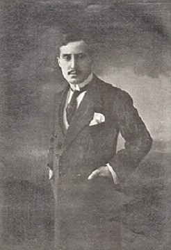 Sandro Camasio